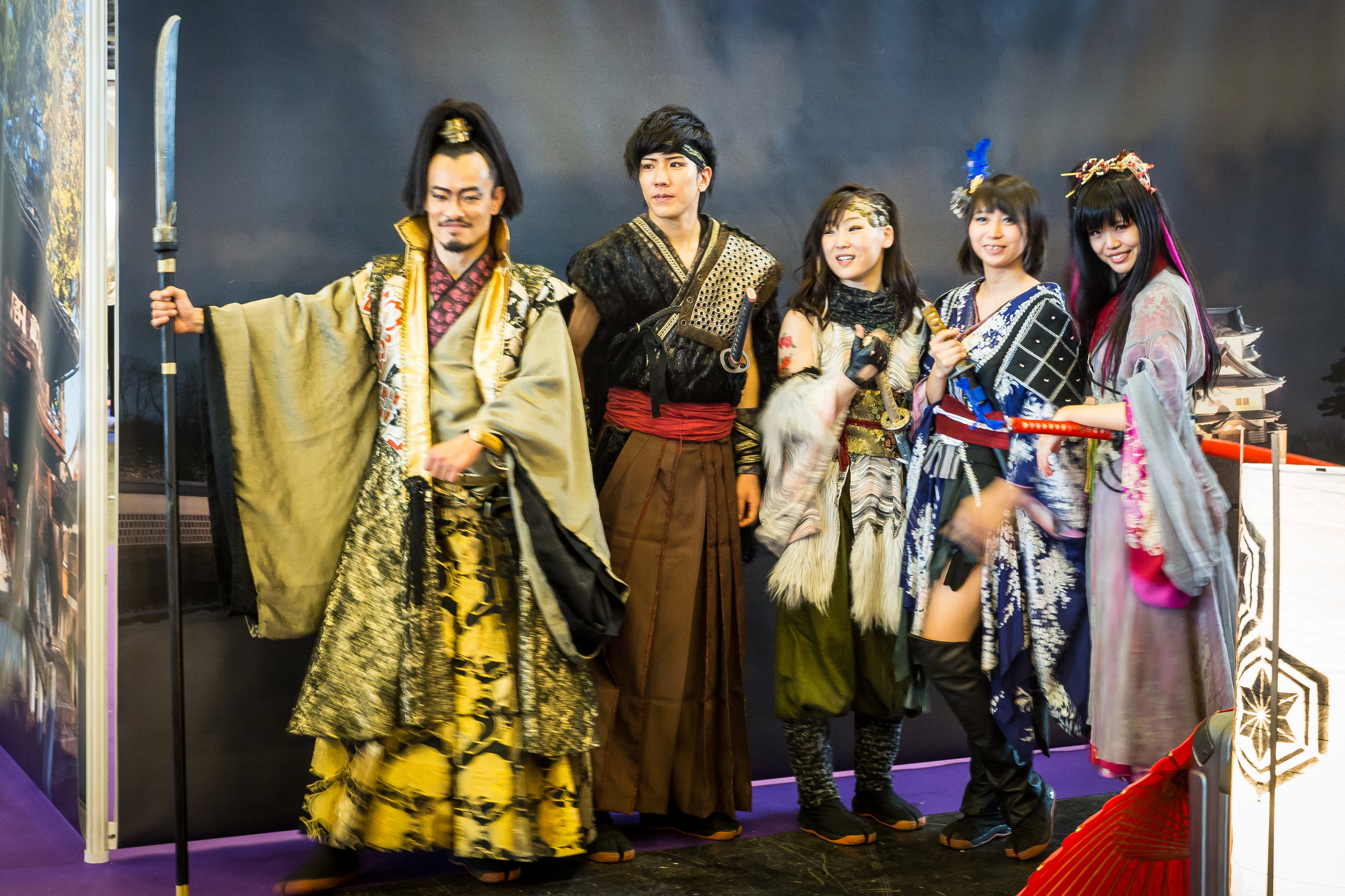 Japan Expo 2017, Parc des Expositions de Villepinte, Paris, France, 6 juillet 2017. Photo: Stéphane Gallay, sous licence Creative Commons (CC-BY)